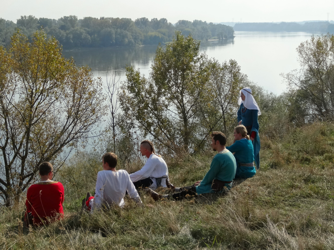 Grodzisko Wyszogród w Bydgoszczy przed inscenizacją historyczną: „Wyszogród – zanim powstała Bydgoszcz”. III edycja. Bitwa o Wyszogród 1113 r. wg Kroniki Galla Anonima